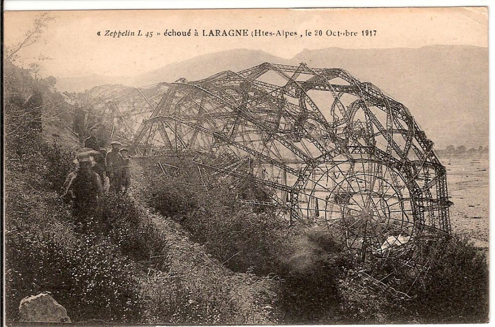 Zeppelin L 45 havaret ved Laragne 20. oktober 1917